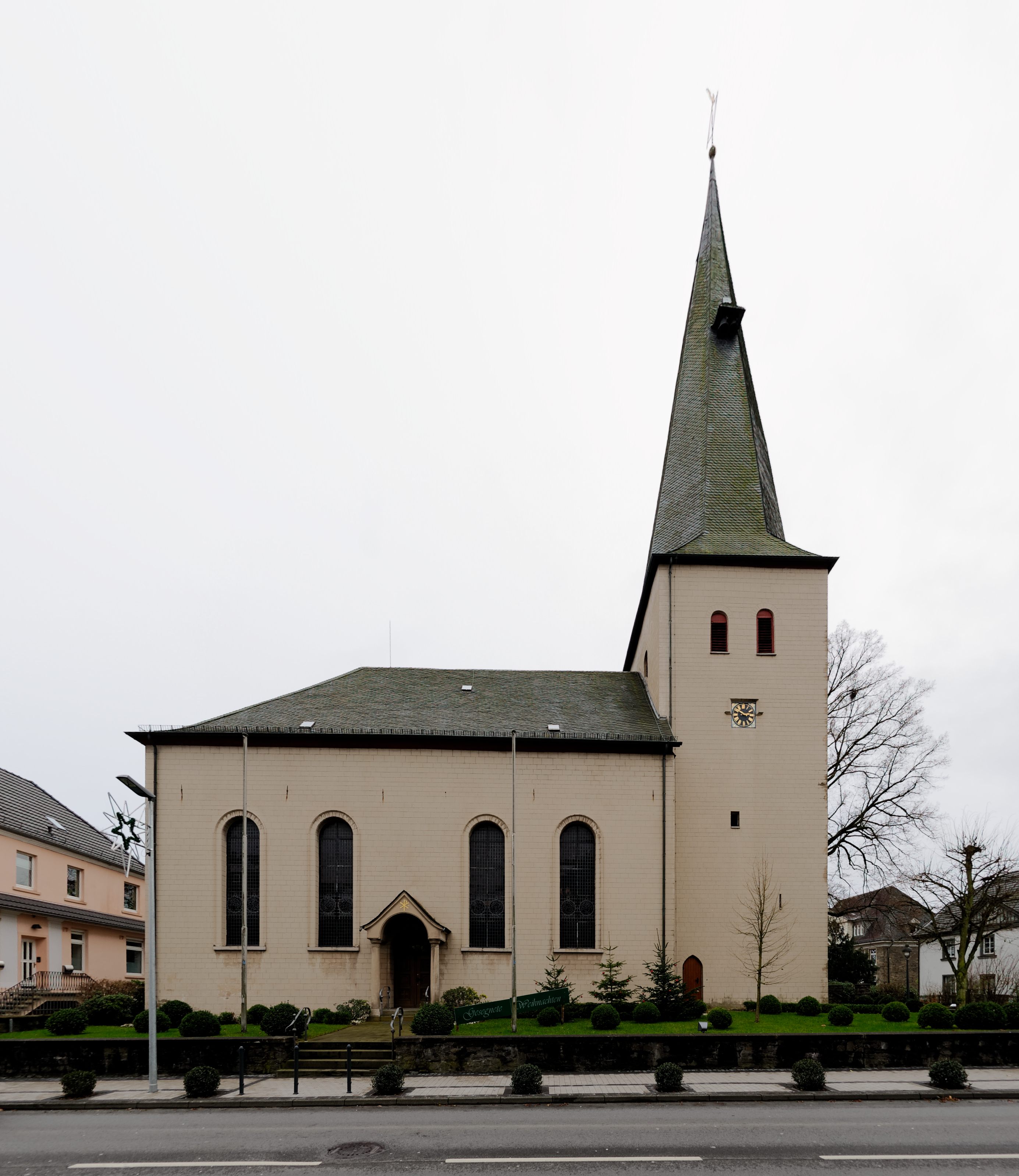 Stammtische Sauerland - Neuenrade